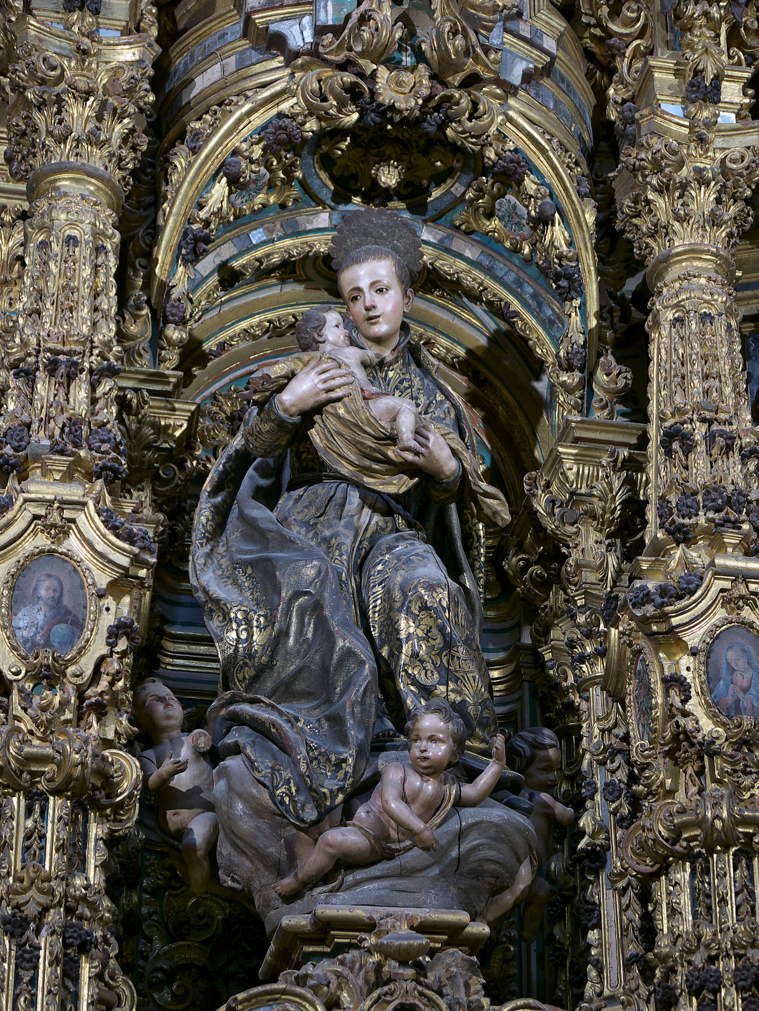 Retablo de San Estanislao de Kostka (1731), Iglesia de San Luis de los Franceses (Sevilla). Un prototipo de la expresividad del barroco sevillano.